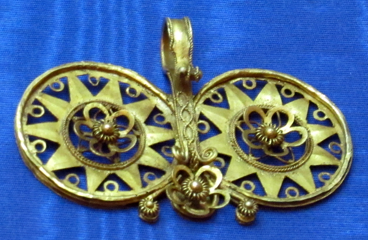 Isola sulawesi, pendente taiganja, sec. xix-xx